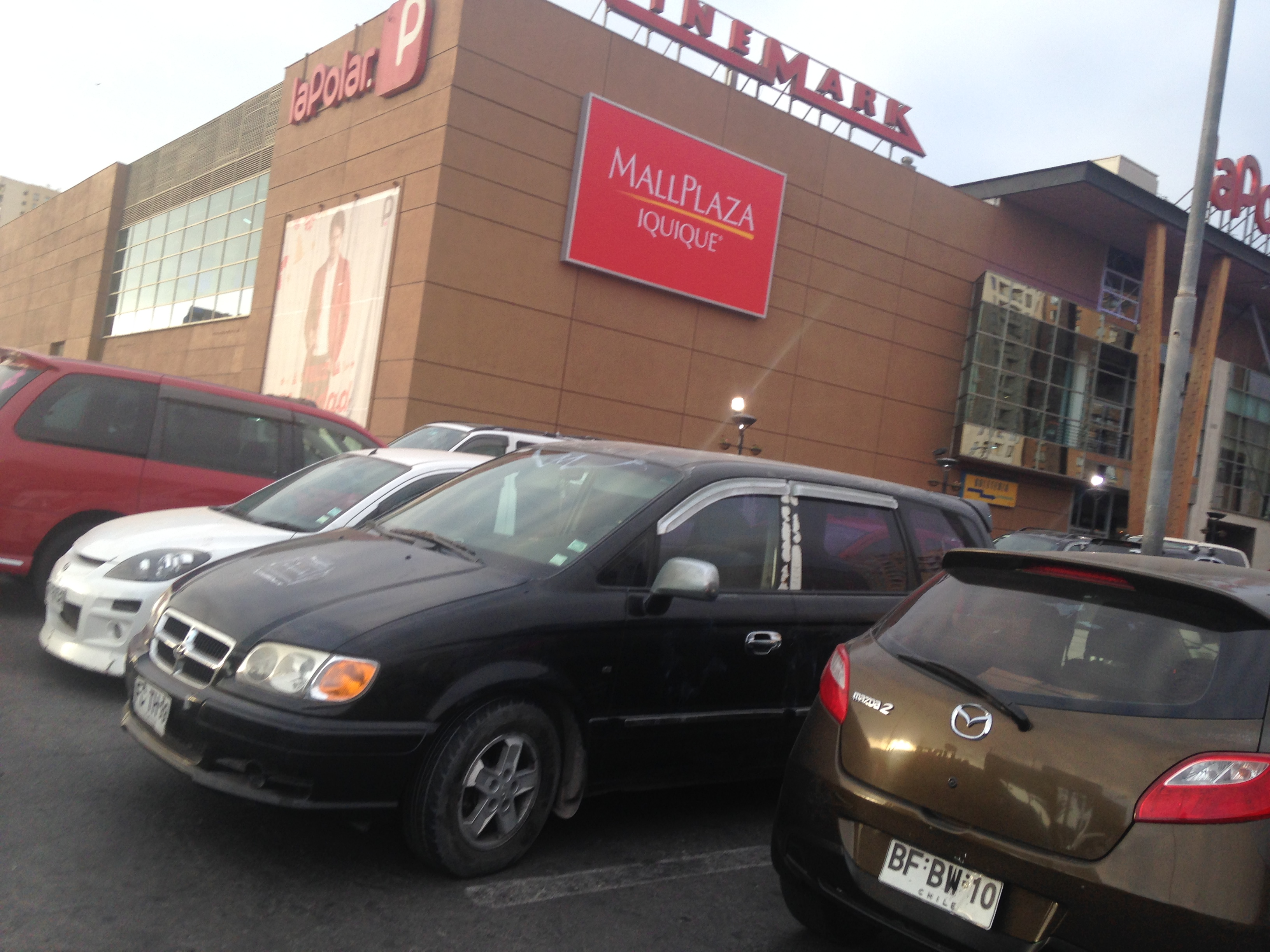 Mall Plaza Iquique. Vista frontal. Nuevo aspecto desde el 17.12.15.